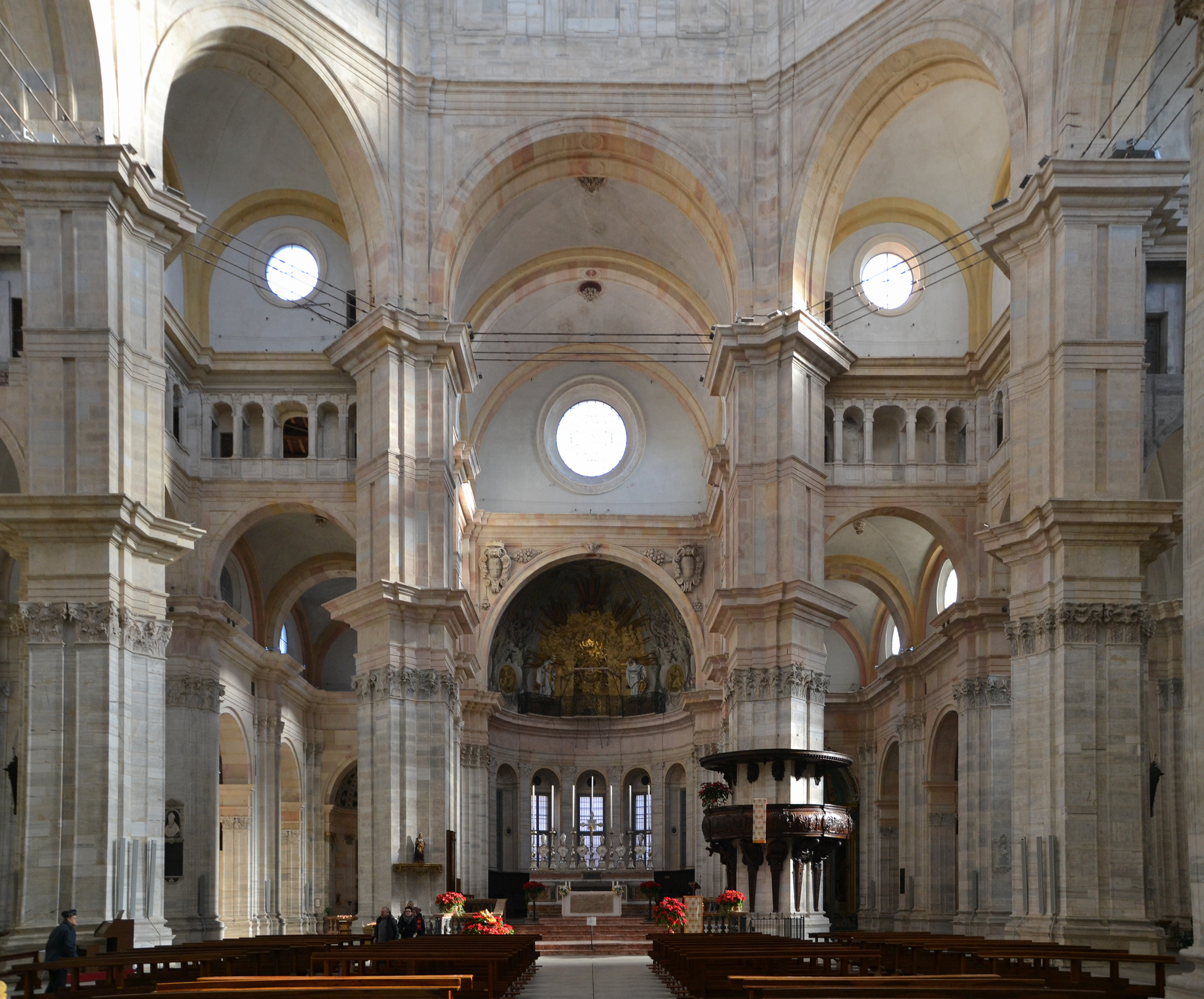 Interno del Duomo (Pavia)